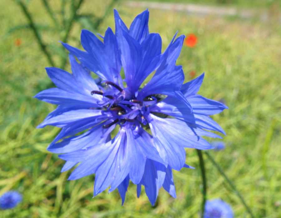 Kornblume (Centaurea cyanus), NSG Warnow-Wiesen